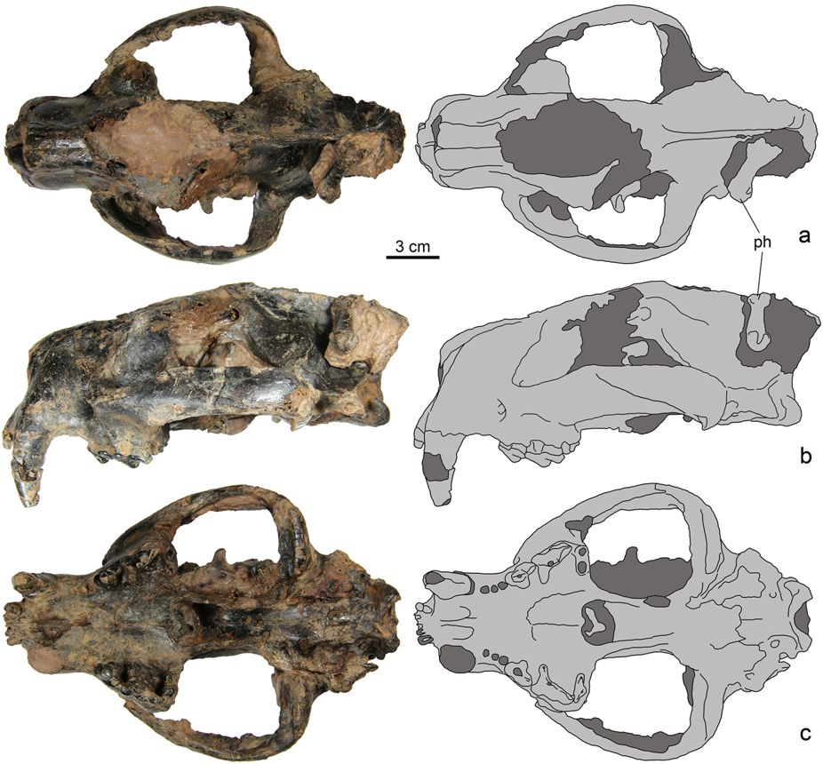 SYSU-M 2, holotype of Maofelis cantonensis gen. and sp. nov., in dorsal (a), lateral (b) and ventral (c) views, photographs and explanatory drawings.